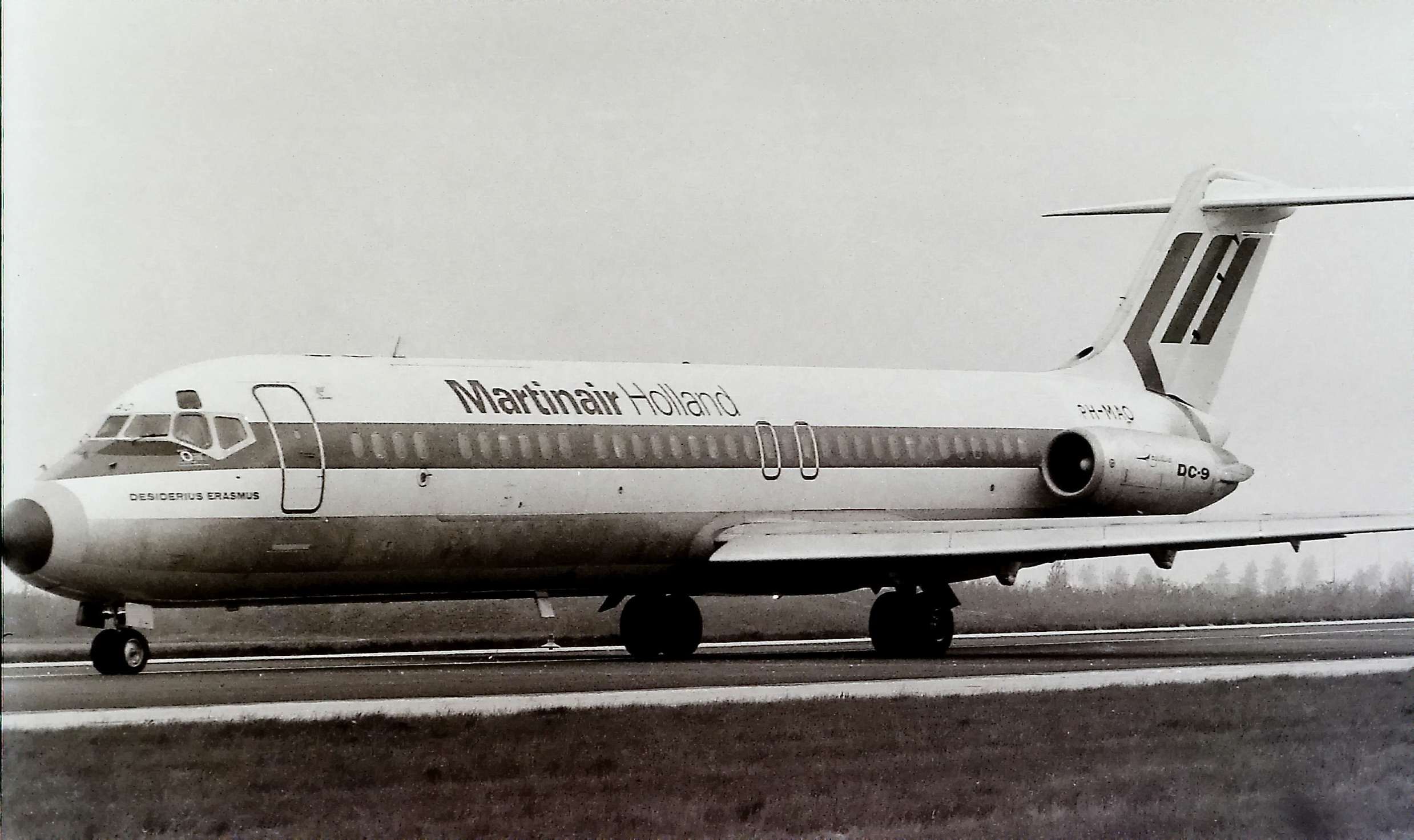 Eine DC-9 der Martinair auf dem Flughafen Schiphol (Aufnahmedatum unbekannt)